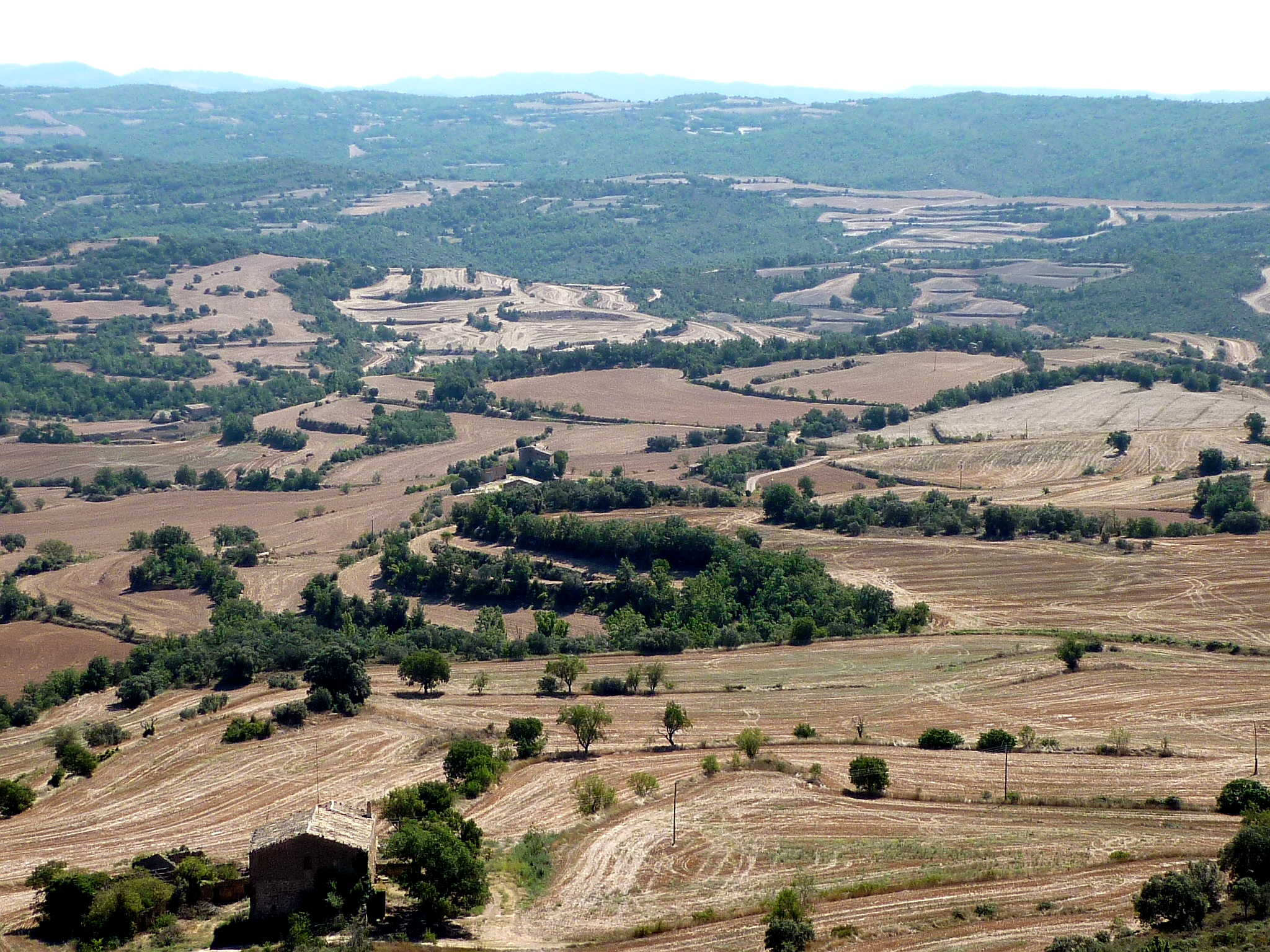 Plans de Puig-redon des del Mas el Soler (Torà)